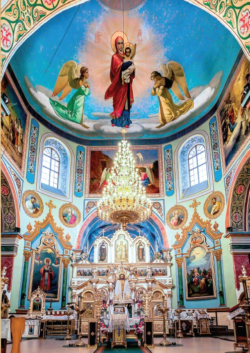 Центральная часть внутреннего убранства Свято-Троицкого храма с. Горыньград Первый